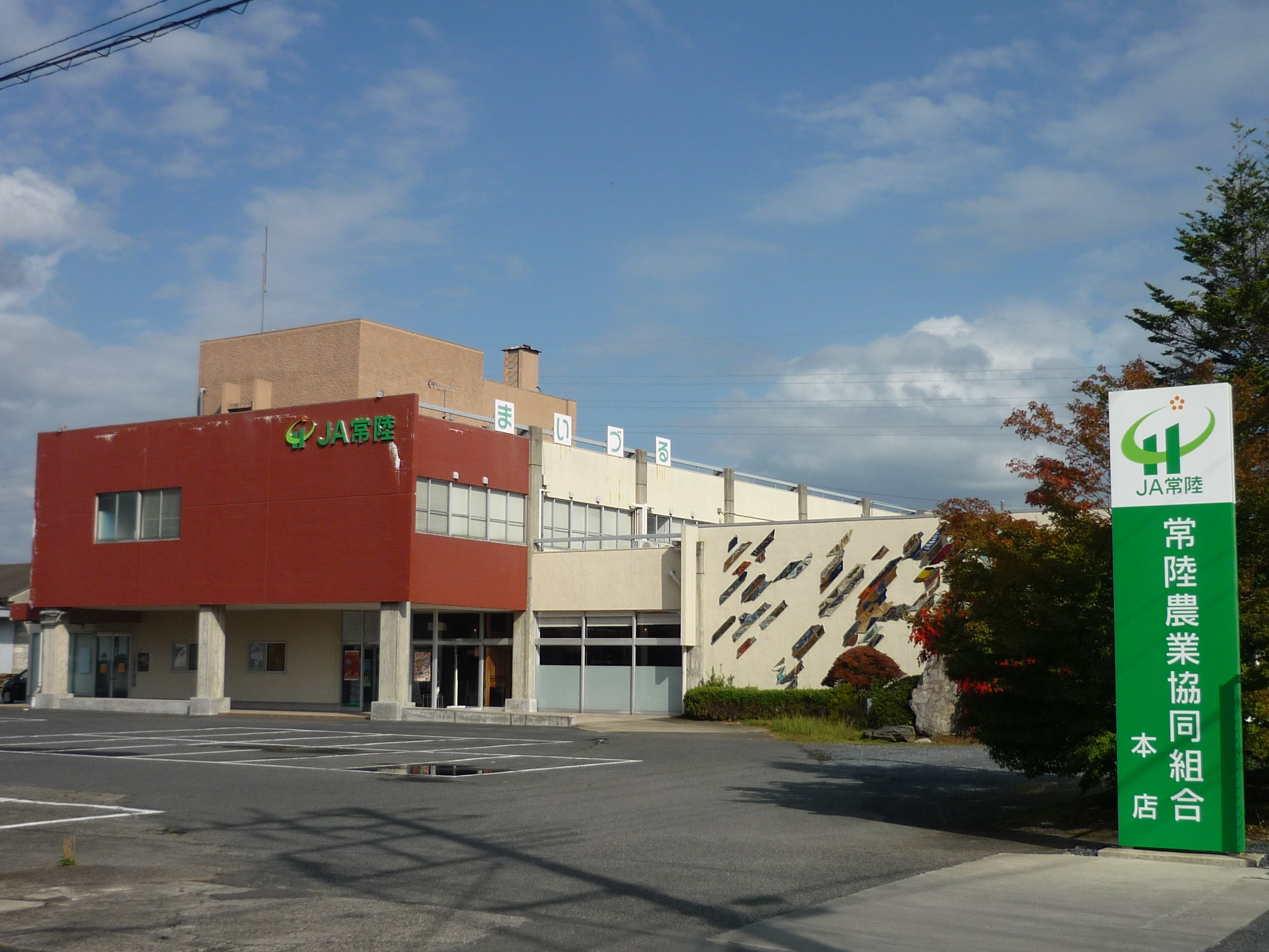 常陸農業協同組合 本店 Panasonic Lumix DMC-FS3